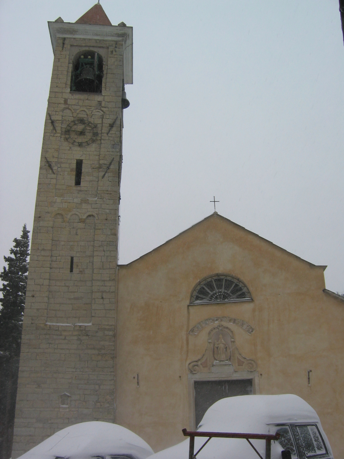 Sant'Eusebio (quartiere di Genova) - La nevicata del 3 e 4 marzo 2005 - La chiesa parrocchiale